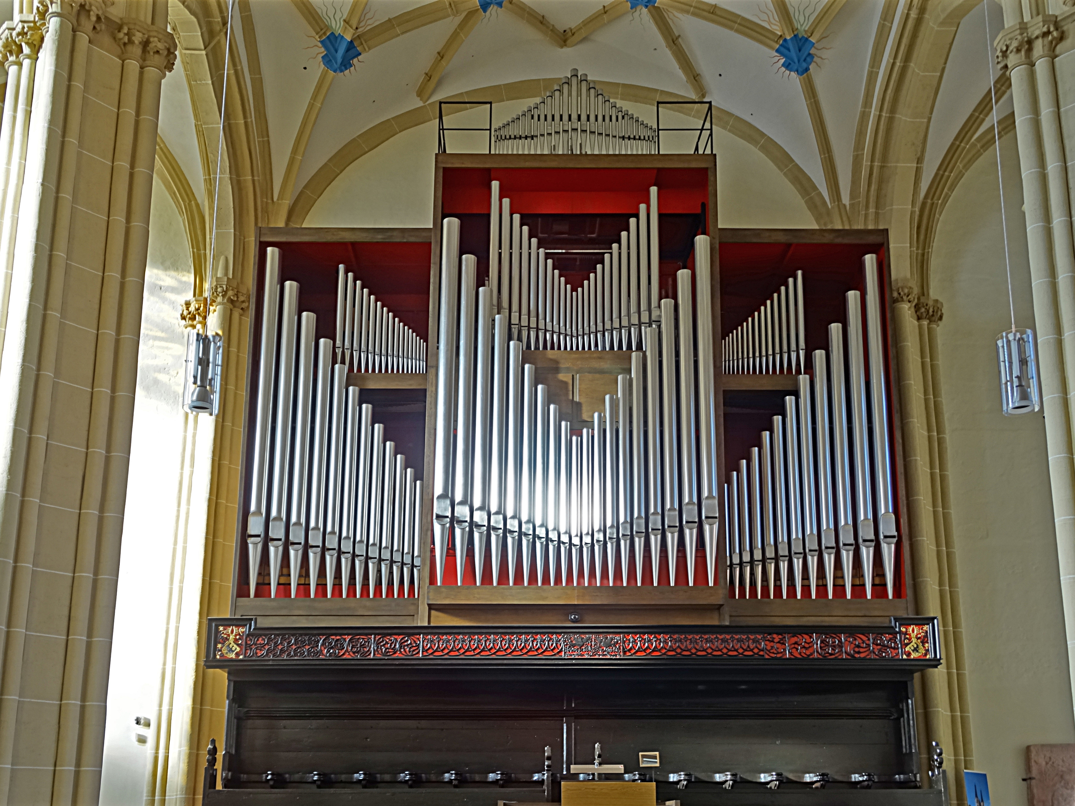 Klais-Orgel (1996) im Dom zum Heiligen Kreuz Nordhausen